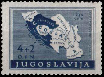 Почтово-благотворительная марка Югославии. Административное деление Югославии